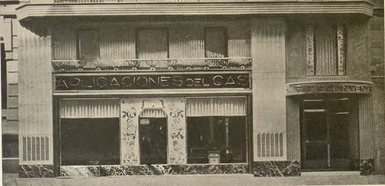 Botiga de ”Aplicaciones del Gas” ubicada a (Barcelona, Catalunya). Disseny de Santiago Marco de 1930. Va guanyar el premi anual de l'Ajuntament de Barcelona.